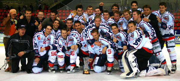 Angers, vainqueur du Trophée Jacques Lacarriére - Match des Champions à Grenoble le 02 septembre 2008